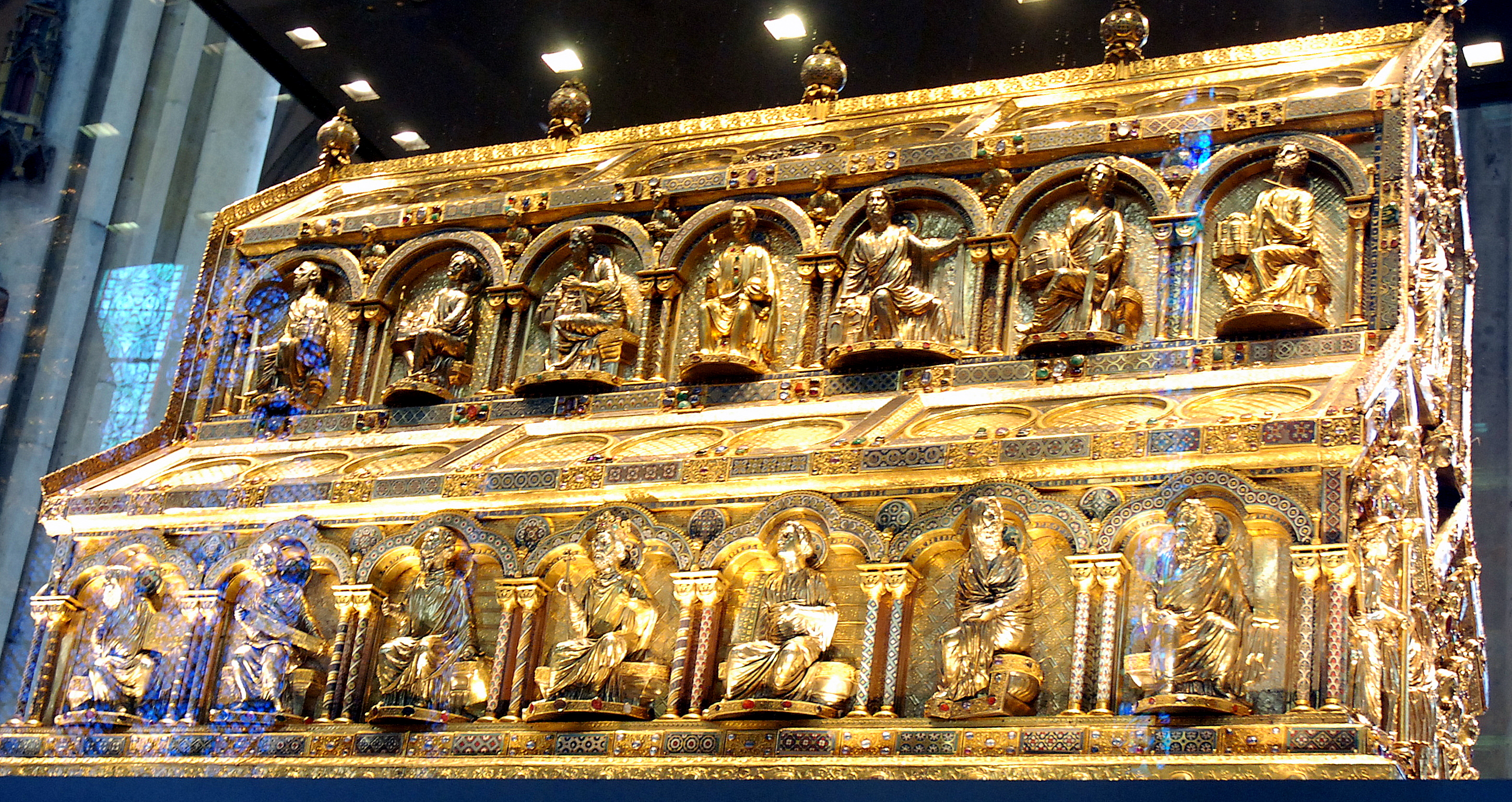 Driekoningenschrijn in de dom van Keulen (Duitsland)